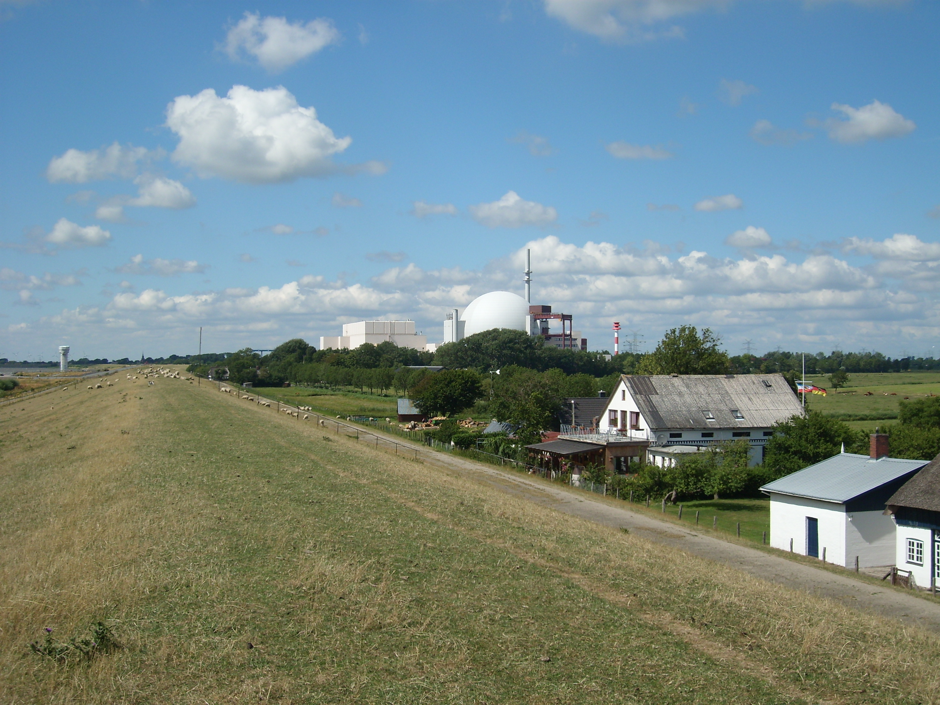 KKW Brokdorf vom Elbdeich in Wewelsfleth aus gesehen